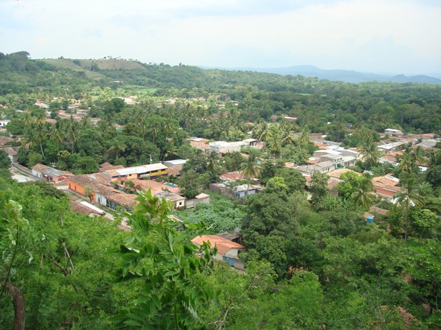 Panoramica de Tejutepeque